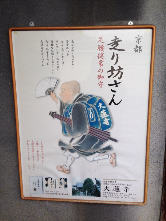 走り坊さん。大蓮寺門前にて